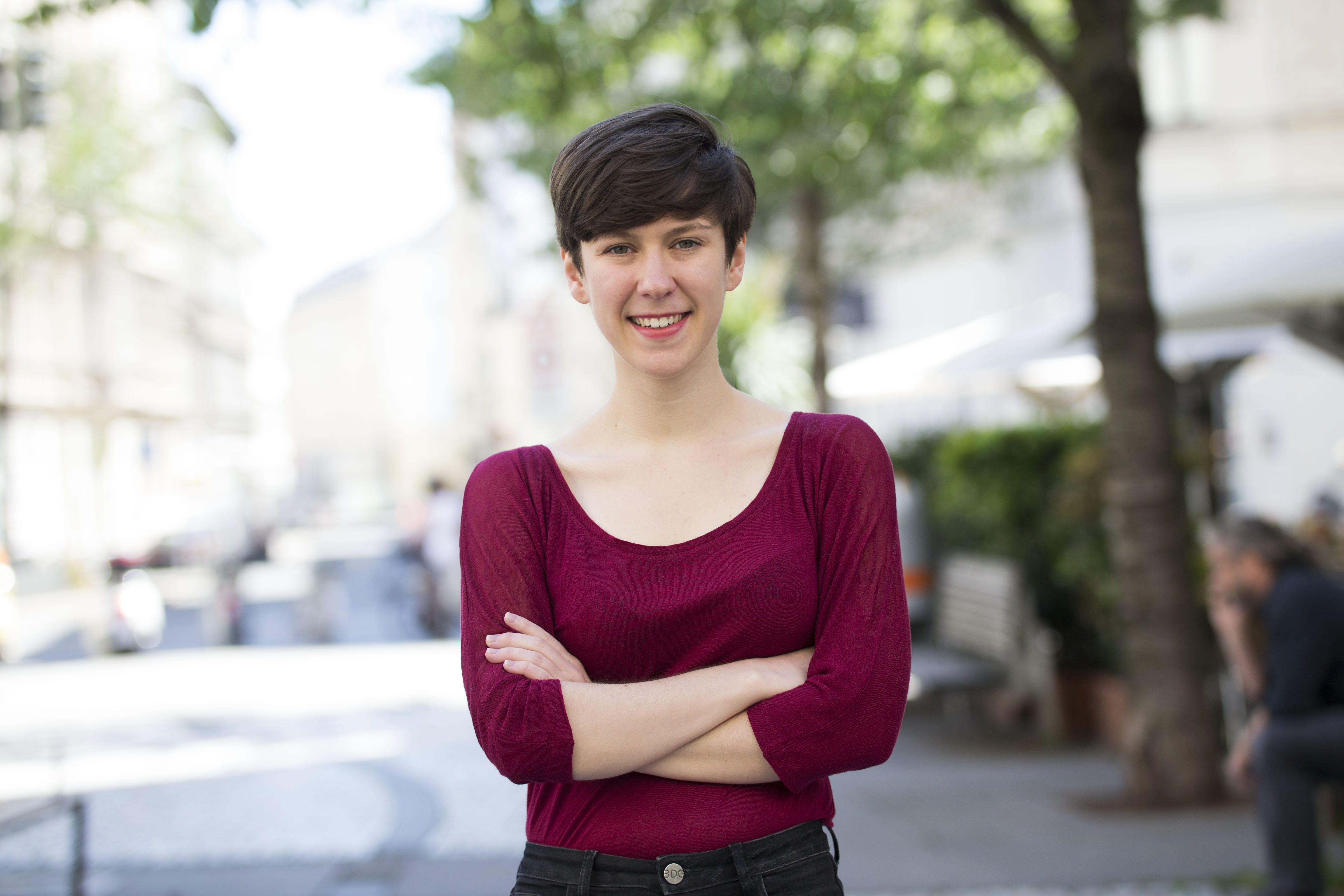 Flora Petrik, 1070 Wien